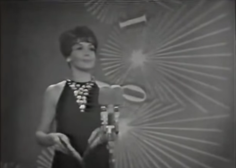 Eurovision Song Contest 1965 Regia di ROMOLO SIENA Allestimento scenografico di FRANCESCO DE MARTINO Luci di GUIDO CARACCIOLO Assistente alla regia ELENA AMICUCCI Assistente di studio MARCELLO SABETTI Capo stuadra tecnica ANGELO FONTANA Prima controllo camere GUSTAVO GALLARATO Capo tecnico audio CIRO PALLONETTO Cameramen ADOLFO BOTTA, SERGIO FREISSENET, ENRICO LANDINI, FLORIDO VARZI ________________________________ Renata Mauro